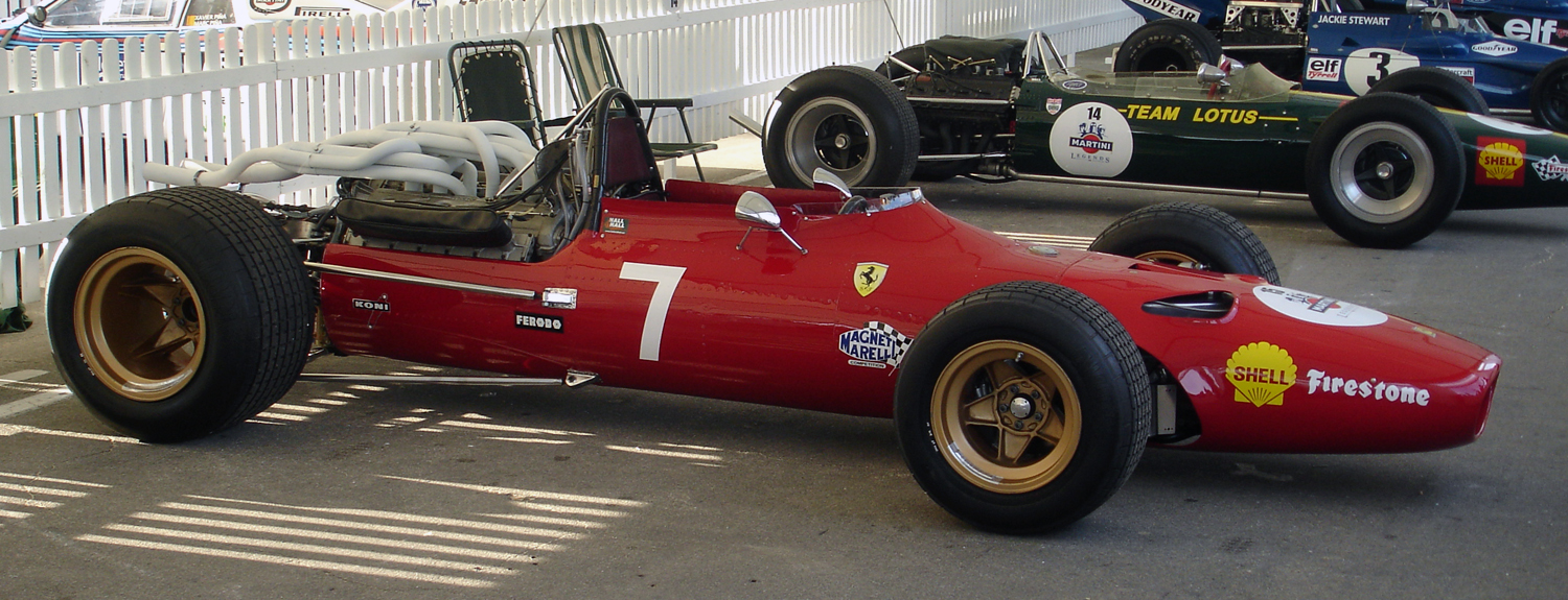 Ferrari 312 exposat al festival Martini Legends (commemoració del 75 aniversari del Circuit de Montjuïc)